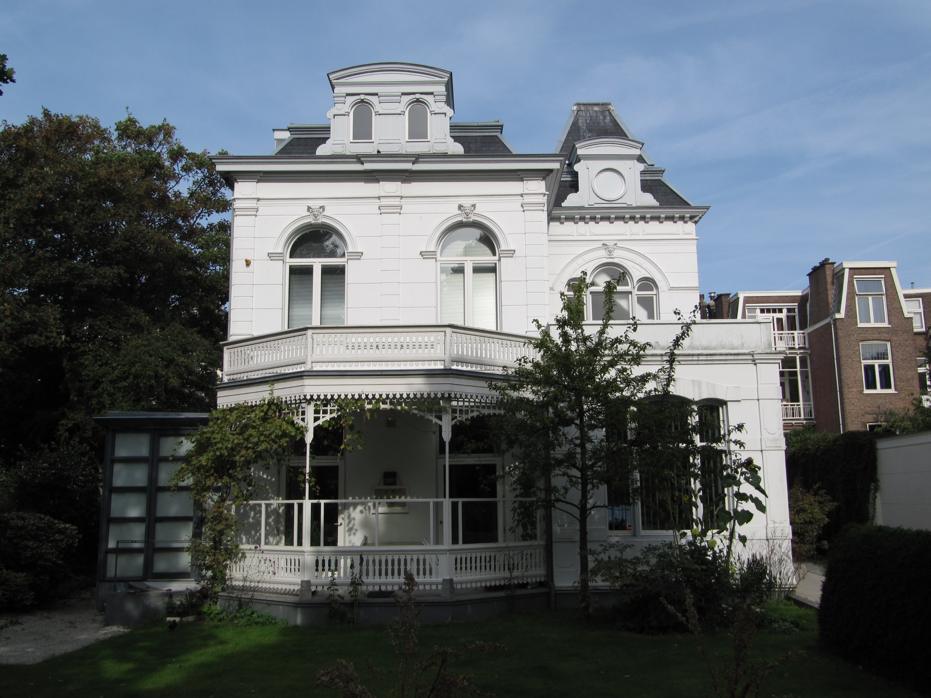 RM452766 Den Haag - Van Stolkweg 24.jpg